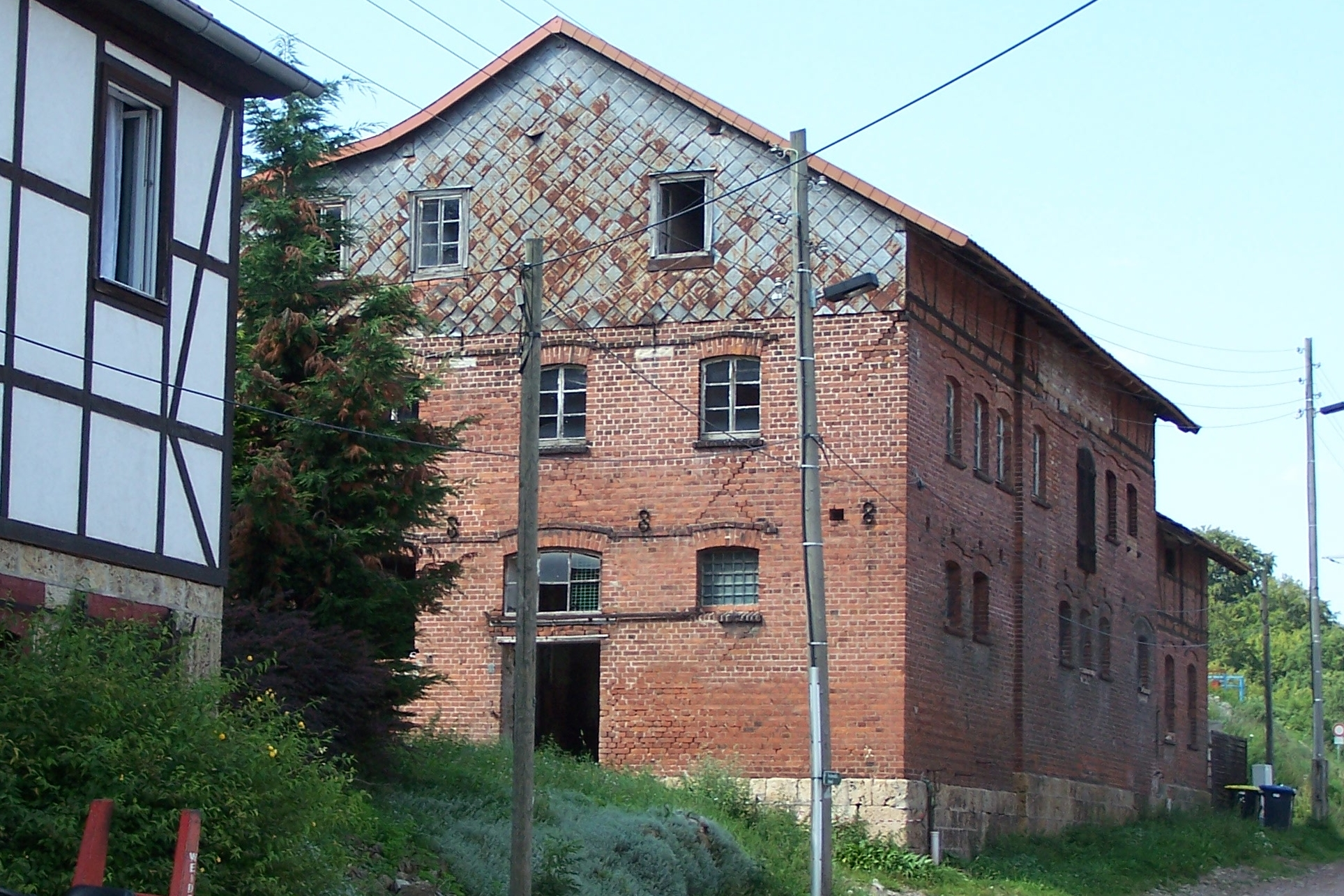 Das Haus Gefilde 6 wurde 1949 als Neubauernhaus eingerichtet. Es entstand durch Umbau des ehemaligen Pferdestalls vom Gutshof Gefilde. Das Haus ist heute unbewohnt und gehört zu den Nebengebäuden des neu entstandenen Reiterhofes Gefilde in Eisenach.